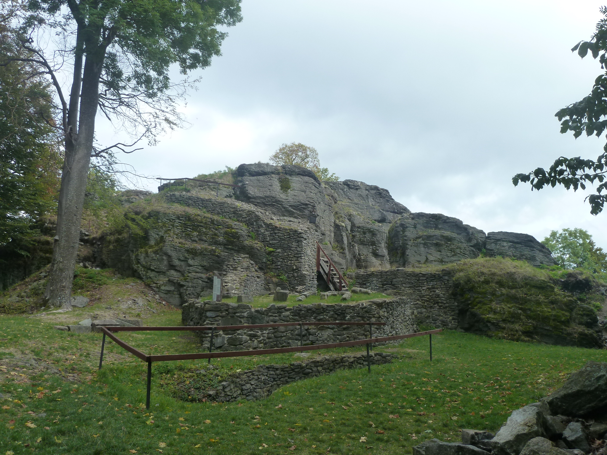 Zrúcanina Sitnianskeho hradu